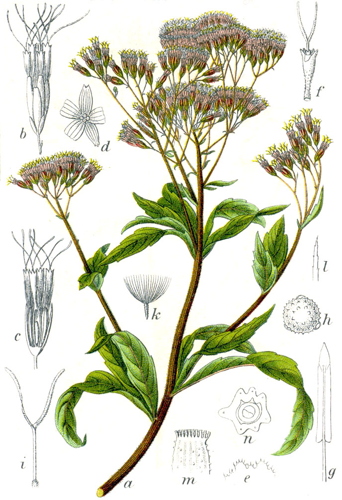 Eupatorium cannabinum L. Original Caption